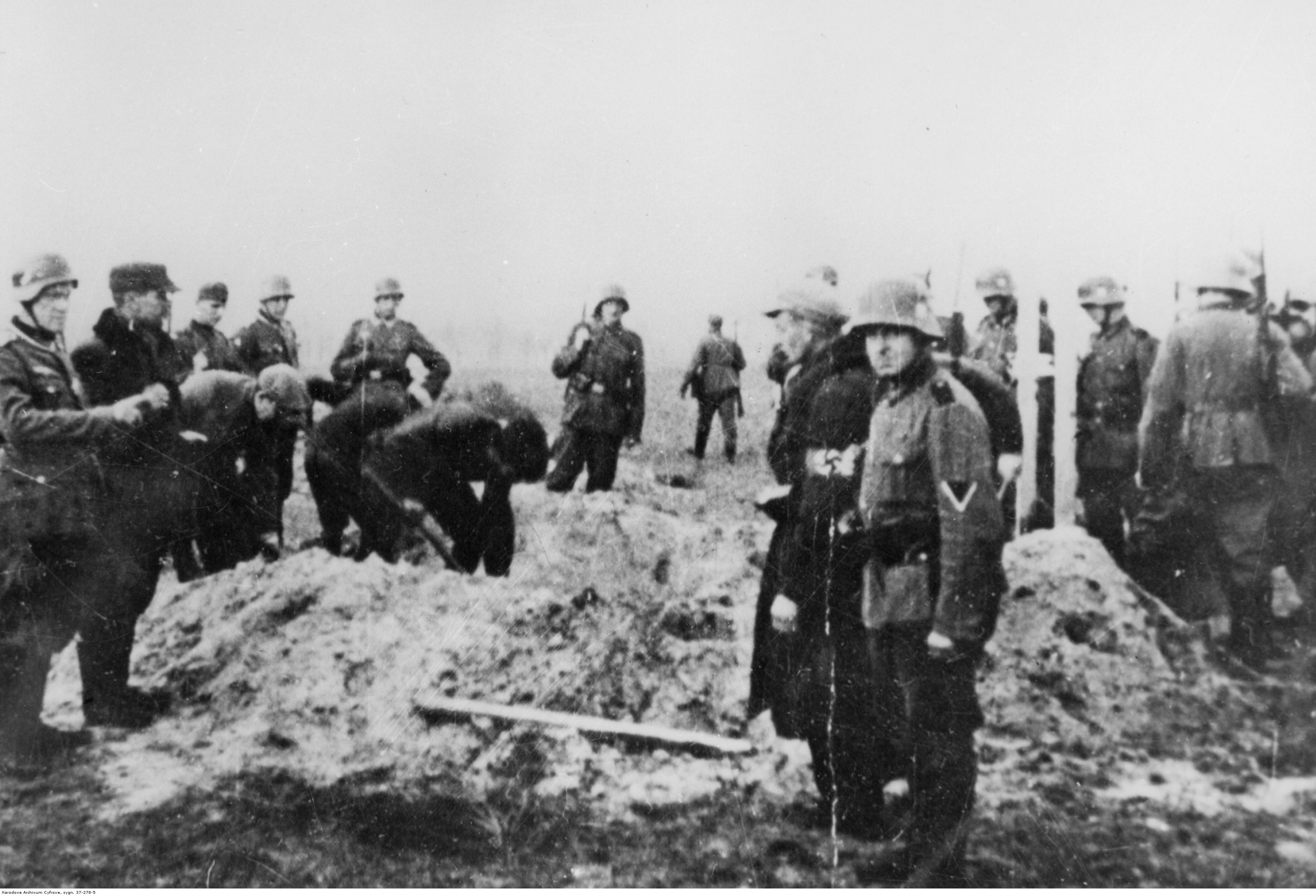 Egzekucje Polaków przez Niemców podczas II wojny światowej w miejscowości Cyców.